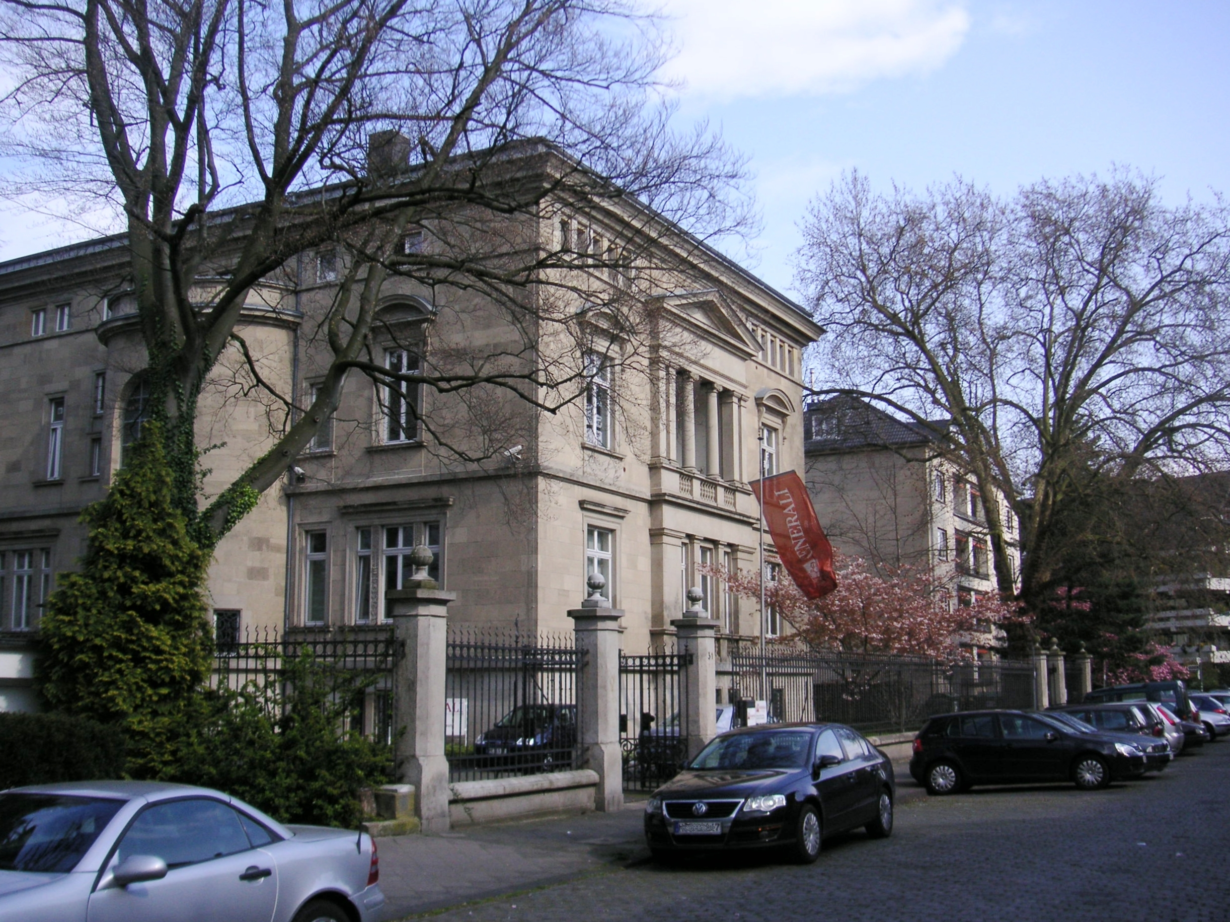 Düsseldorf-Düsseltal, Stadtpalais Gebr. Kiefer, Humboldtstr. 31, Bj. 1898/99